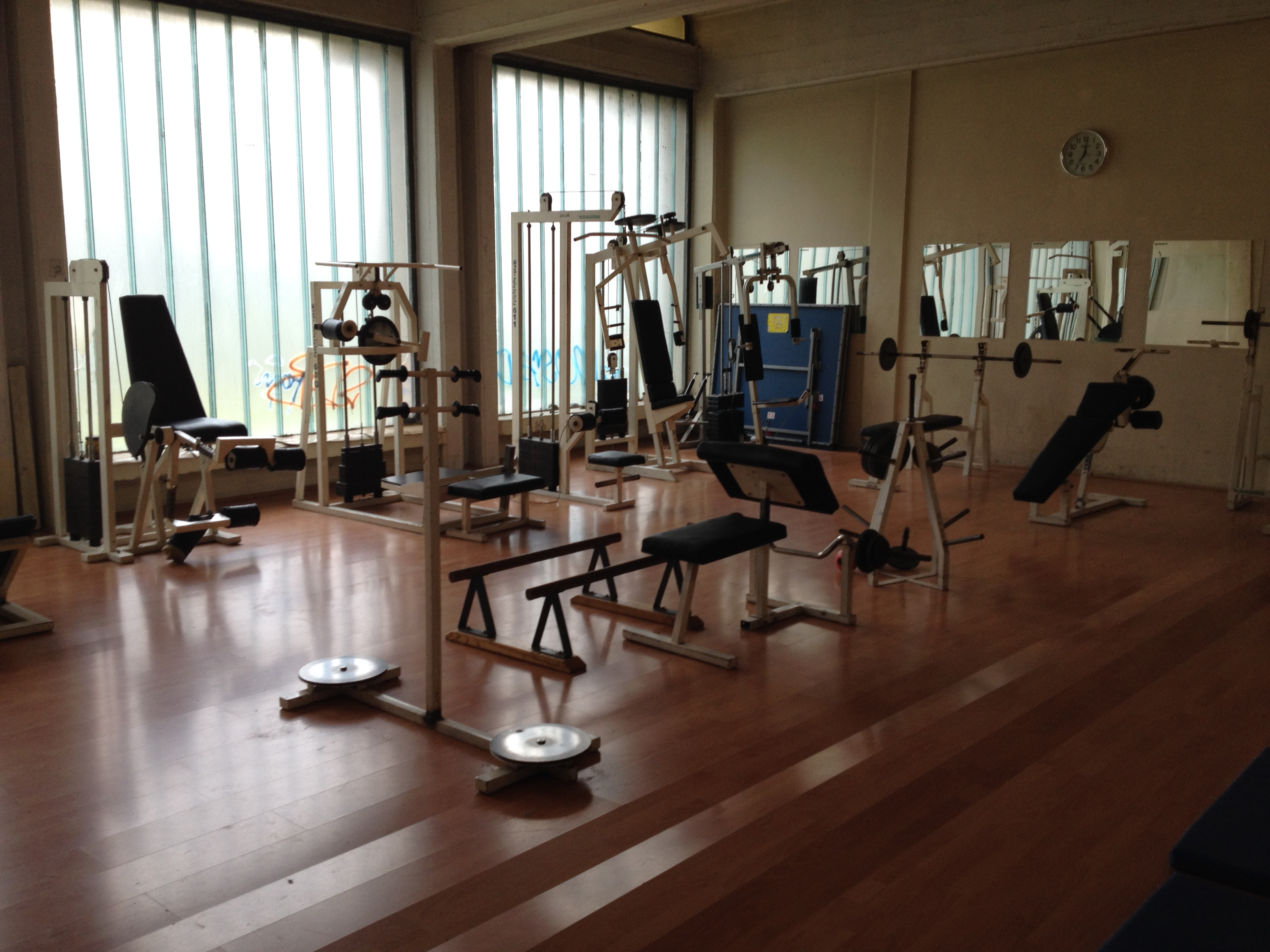 Фитнес салата на Орце Николов во склоп на спортската сала.